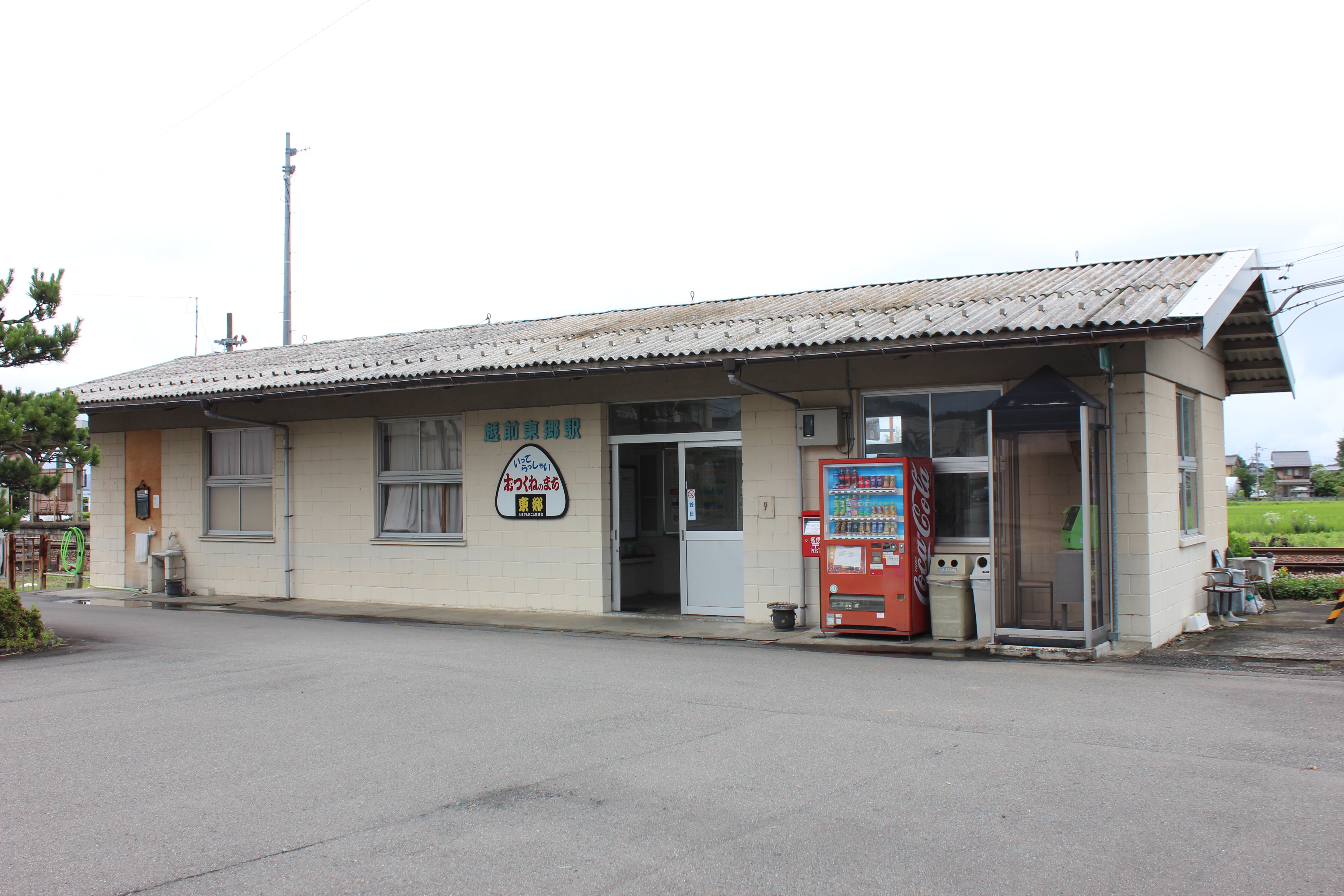 越前東郷駅（福井県福井市） Canon EOS Kiss X5